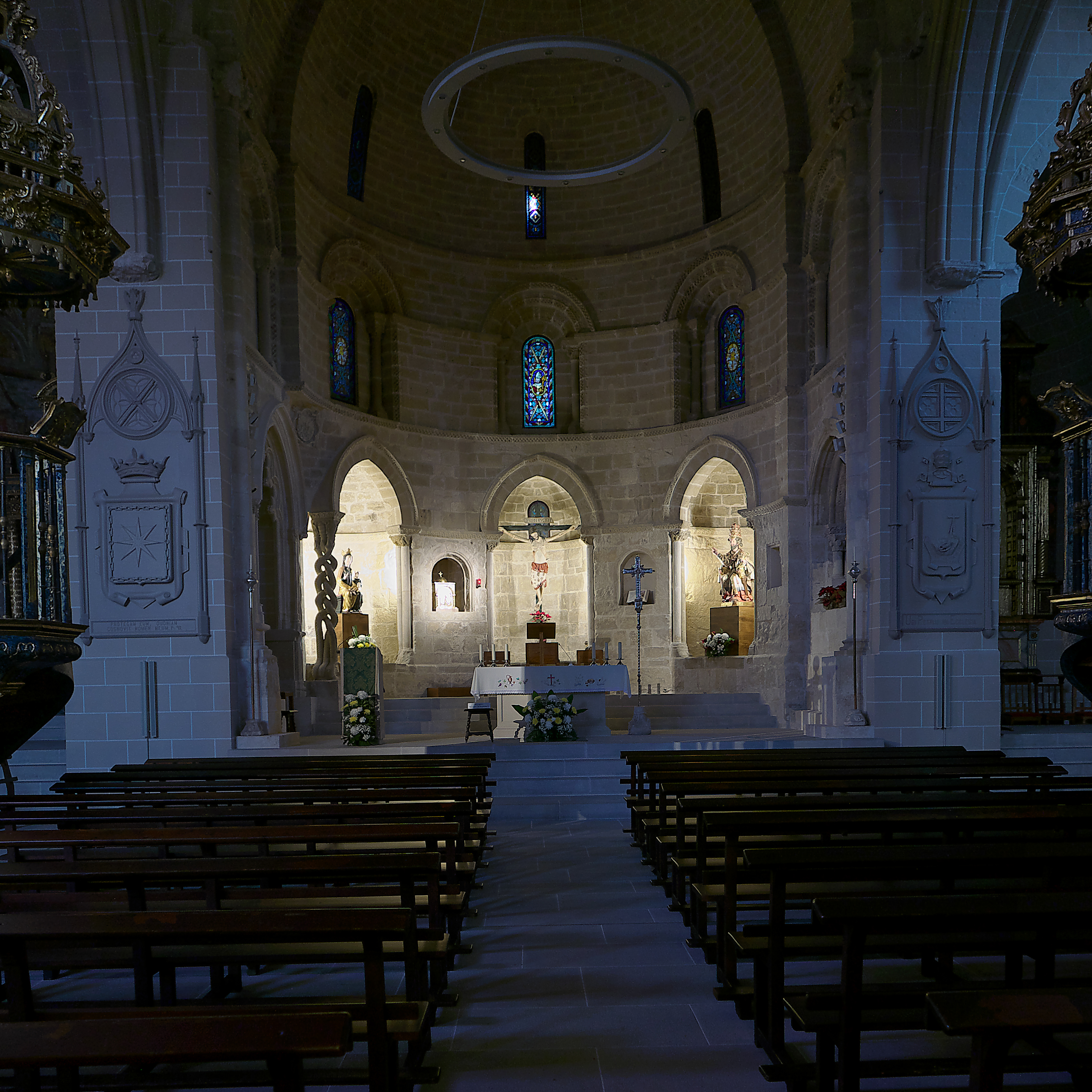 Presbiterio de la iglesia.